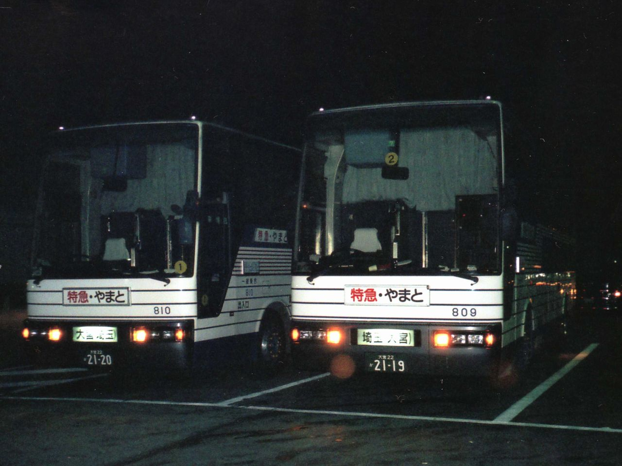 Kokusai Kogyo Bus 809 & 810 "Yamato" Isuzu P-LV719R at Ashigara Service Area